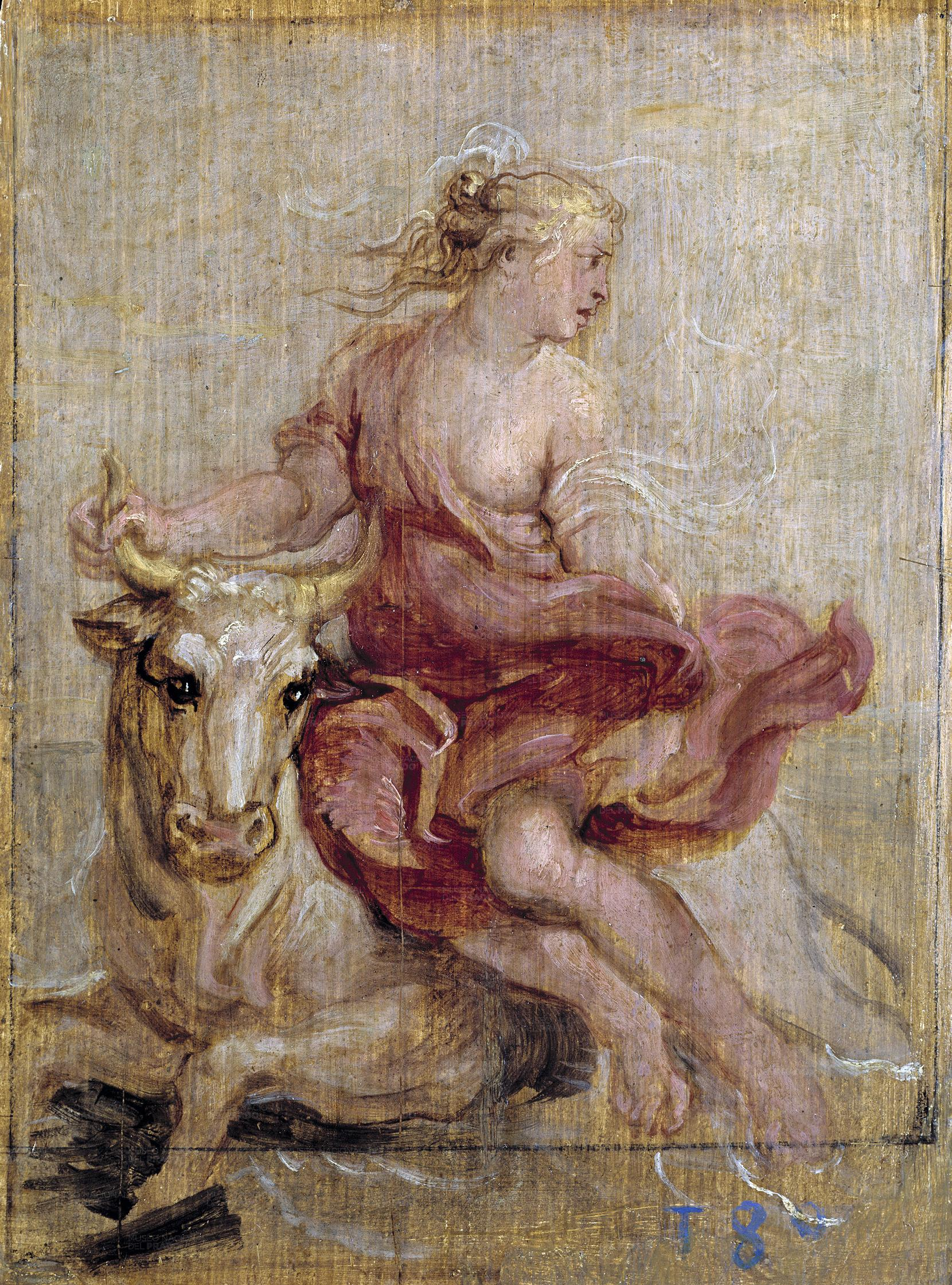 Europa se aleja de sus compañeras, situadas fuera de la escena, a las que dirige una última mirada, mientras es llevada por Júpiter, que, enamorado, se había transformado en toro para poder acercarse a la joven. La historia narrada en Las Metamorfosis de Ovidio, es representada por Rubens de manera muy sucinta en este boceto, previo a la realización del cuadro del mismo tema, que Erasmus Quellinus hizo para la Torre de la Parada.